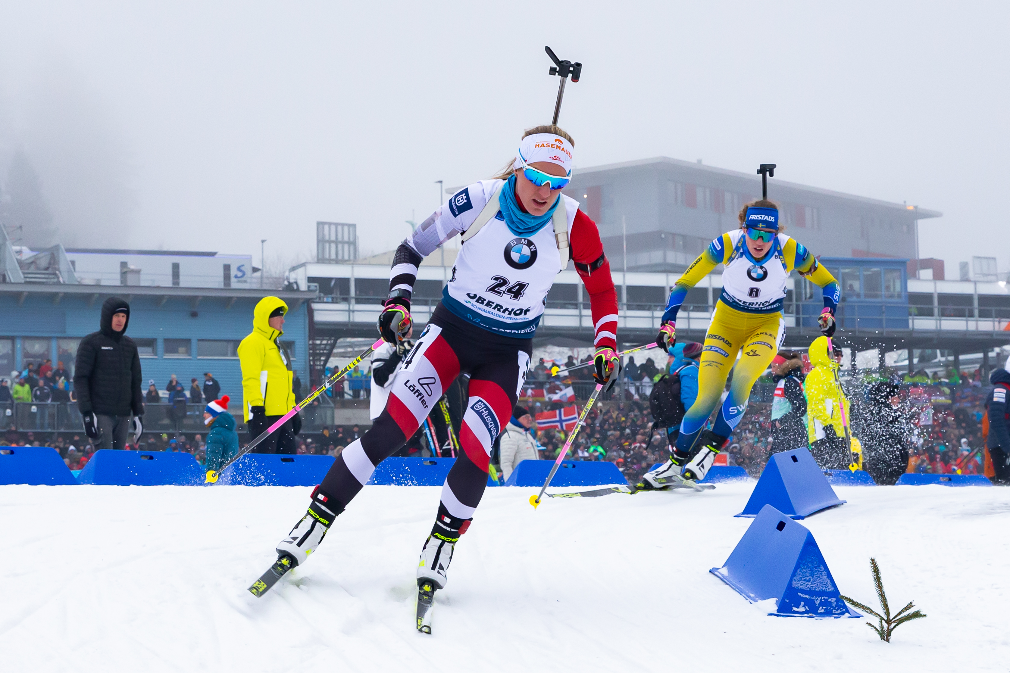 IBU World Cup Biathlon Oberhof; Katharina Innerhofer (AUT, Österreich), dahinter Hanna Oeberg (SWE, Schweden)